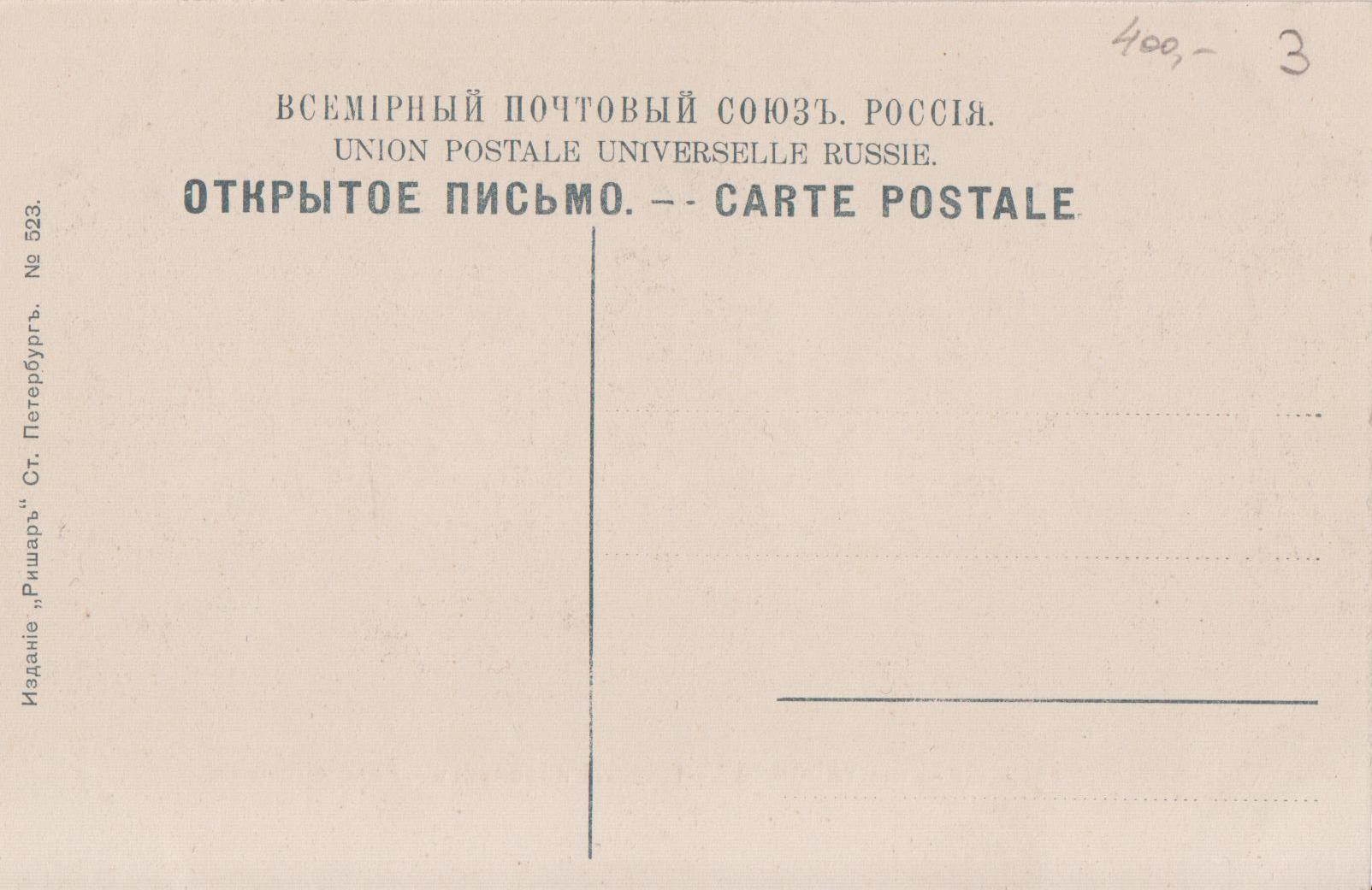 Открытка изд-ва «Ришар», Санкт-Петербург, №0523, Невский проспект